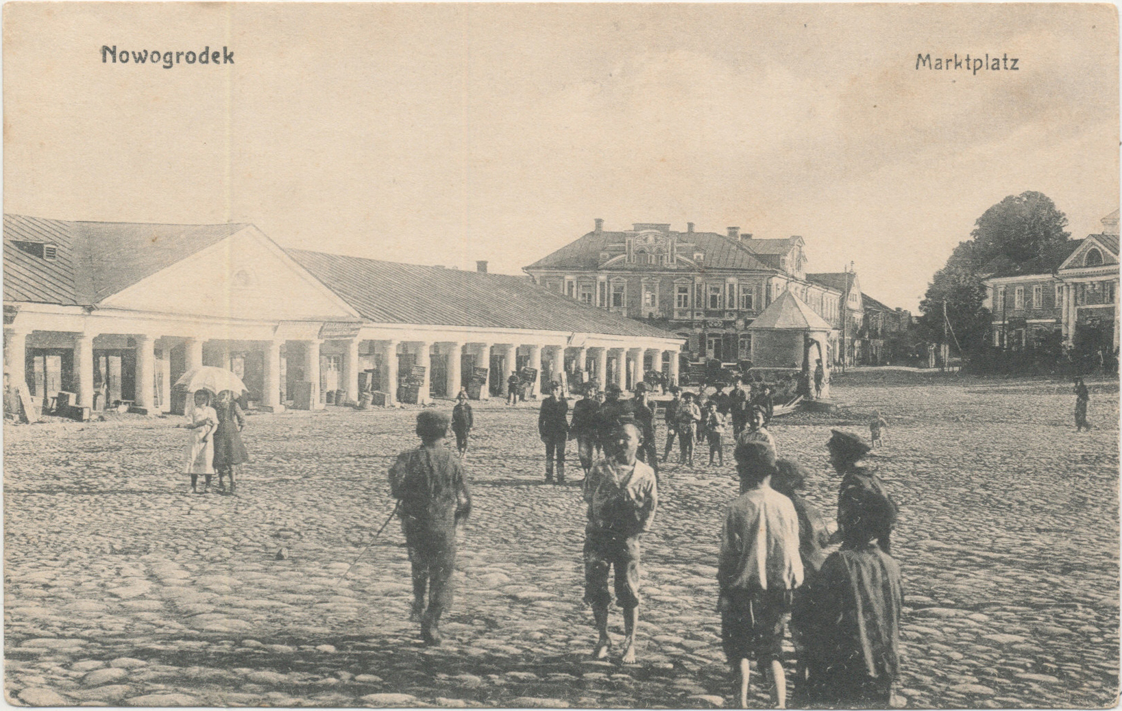 Беларуская (тарашкевіца): Наваградак (Navahradak), рог пляцу Рынку (plac Rynak) і вуліцы Жыдоўскай (vulica Žydoŭskaja)